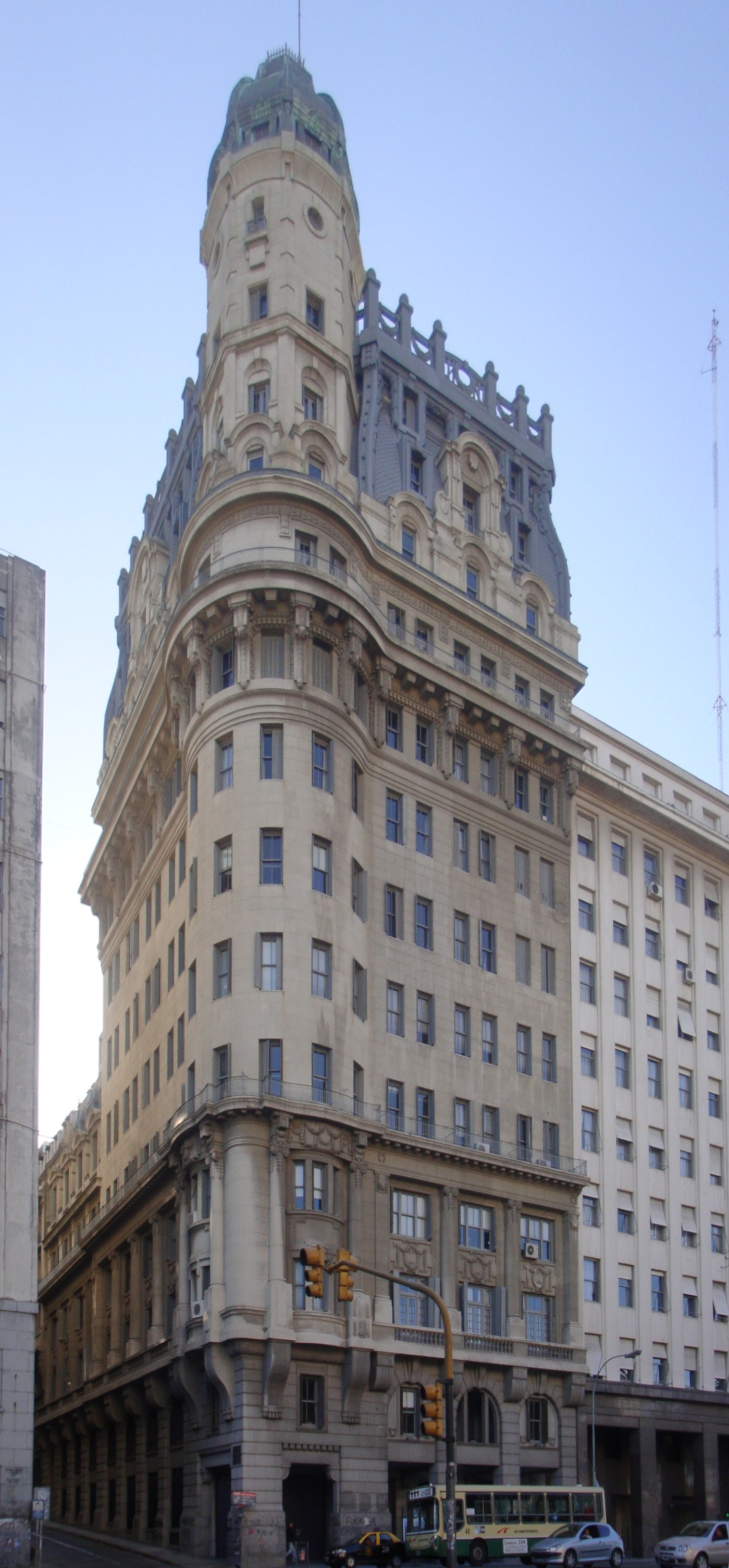 Intersección de la Avenida Paseo Colón y la calle Alsina, Monserrat, Buenos Aires.